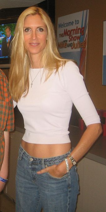 Ann Coulter 2007